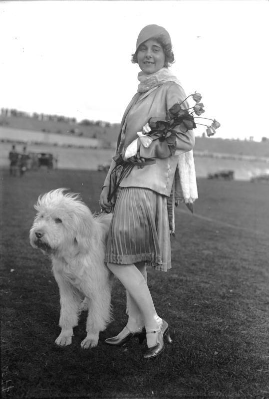 Das große Herbst-Auto-Turnier des Automobil-Clubs! Die bekannte Kunstreiterin Cilly Feindt als Zuschauerin im Stadion während des Blumen-Korsos.